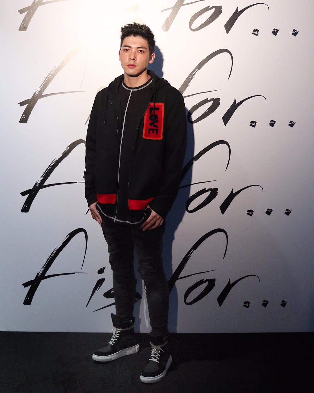 中文（香港）: 羅孝勇 at Fendi Party